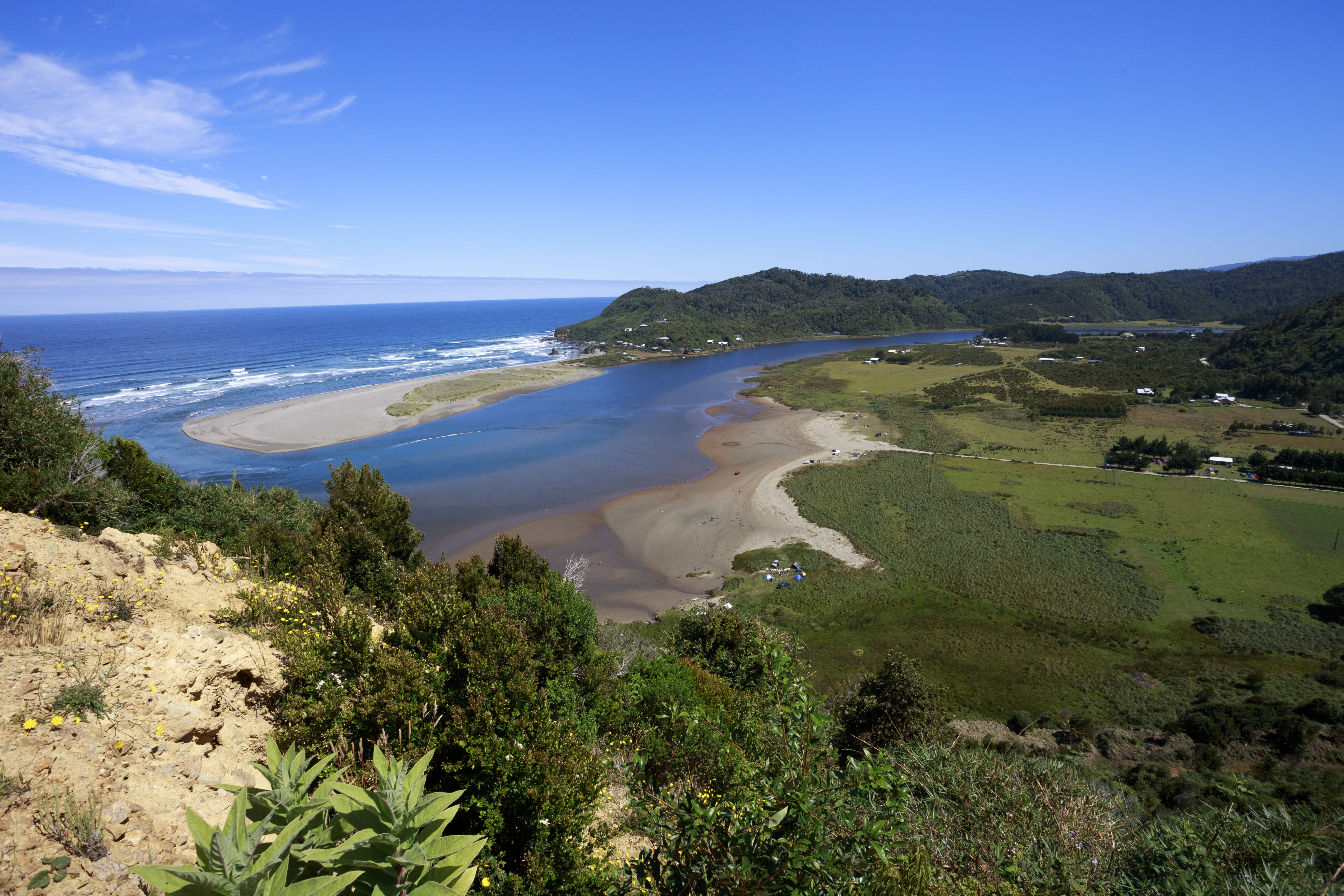 Desembocadura del río Llico